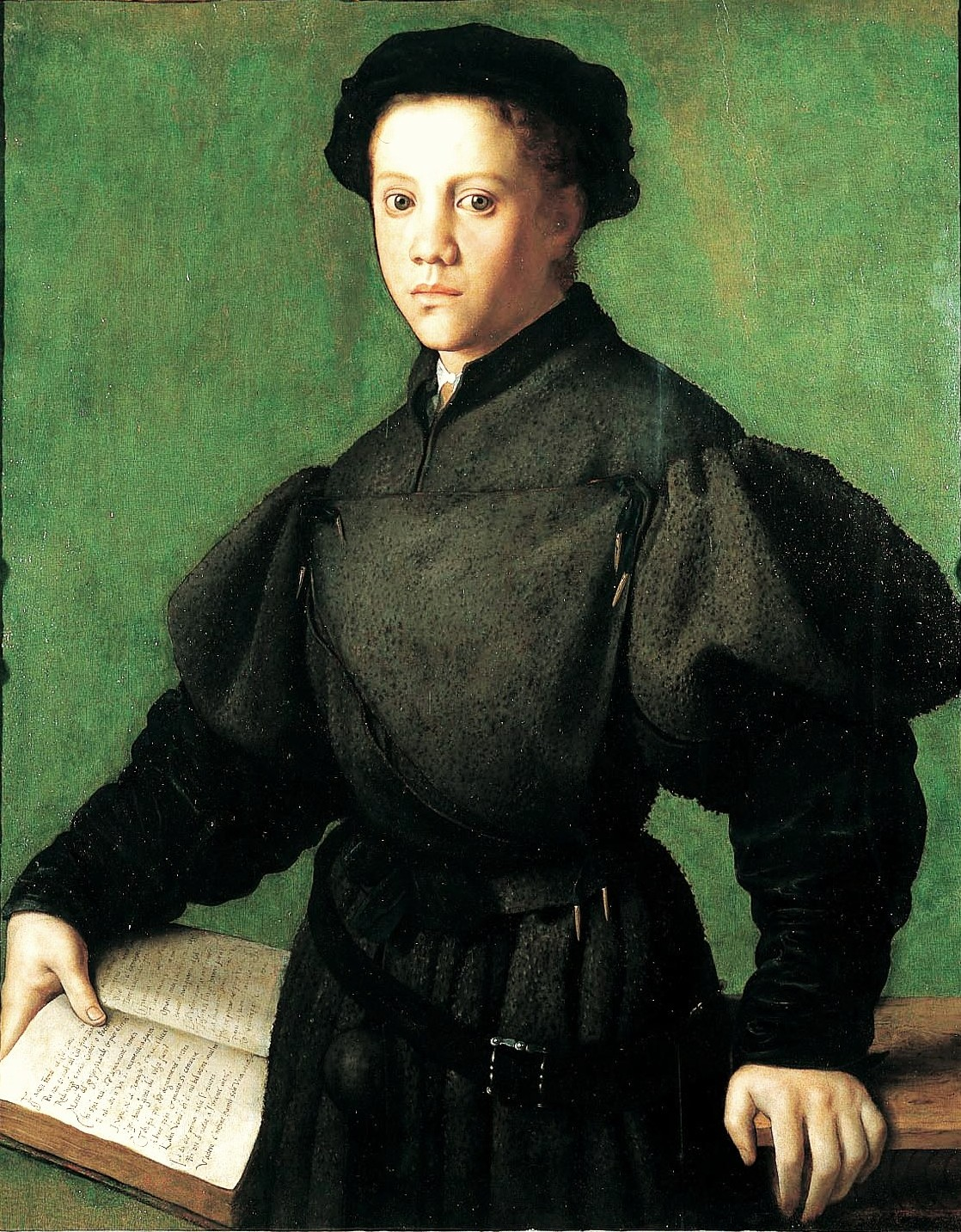 Portrait of Lorenzo Lenzi